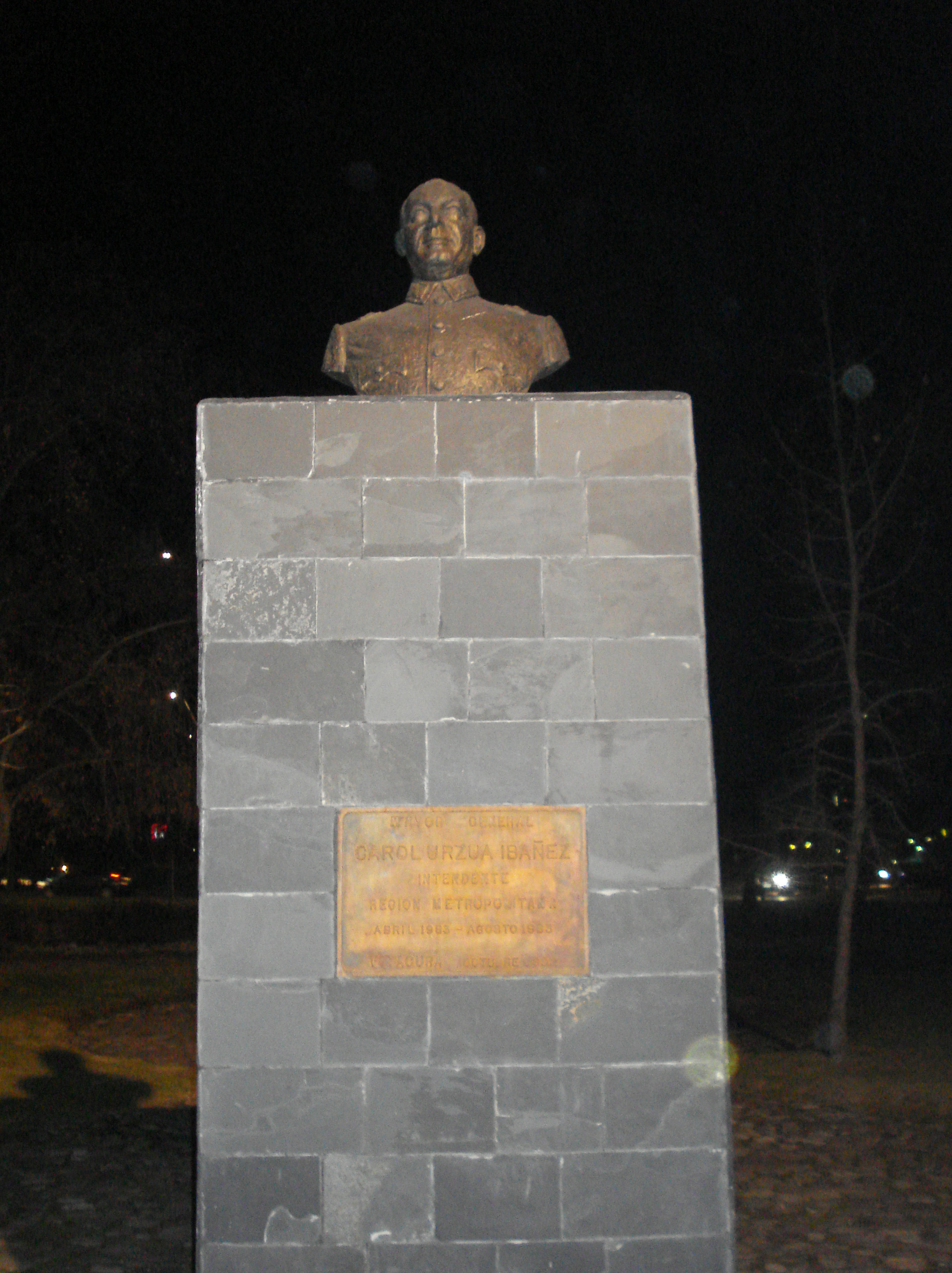 Monumento a Carol Urzua en la comuna de Vitacura. Carol Miguel Ángel Urzúa Ibáñez (Parral, 7 de febrero de 1926 - Santiago de Chile, 30 de agosto de 1983) fue un militar chileno. Durante la dictadura militar se desempeñó como intendente de Antofagasta y de Santiago.